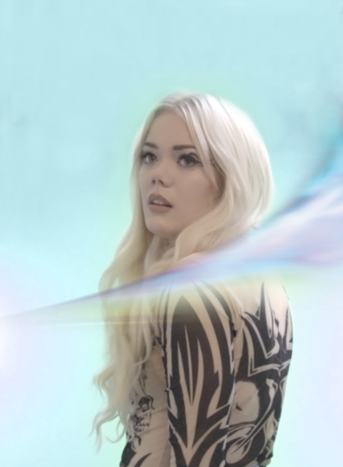 Little Jinder, pressbild november 2015